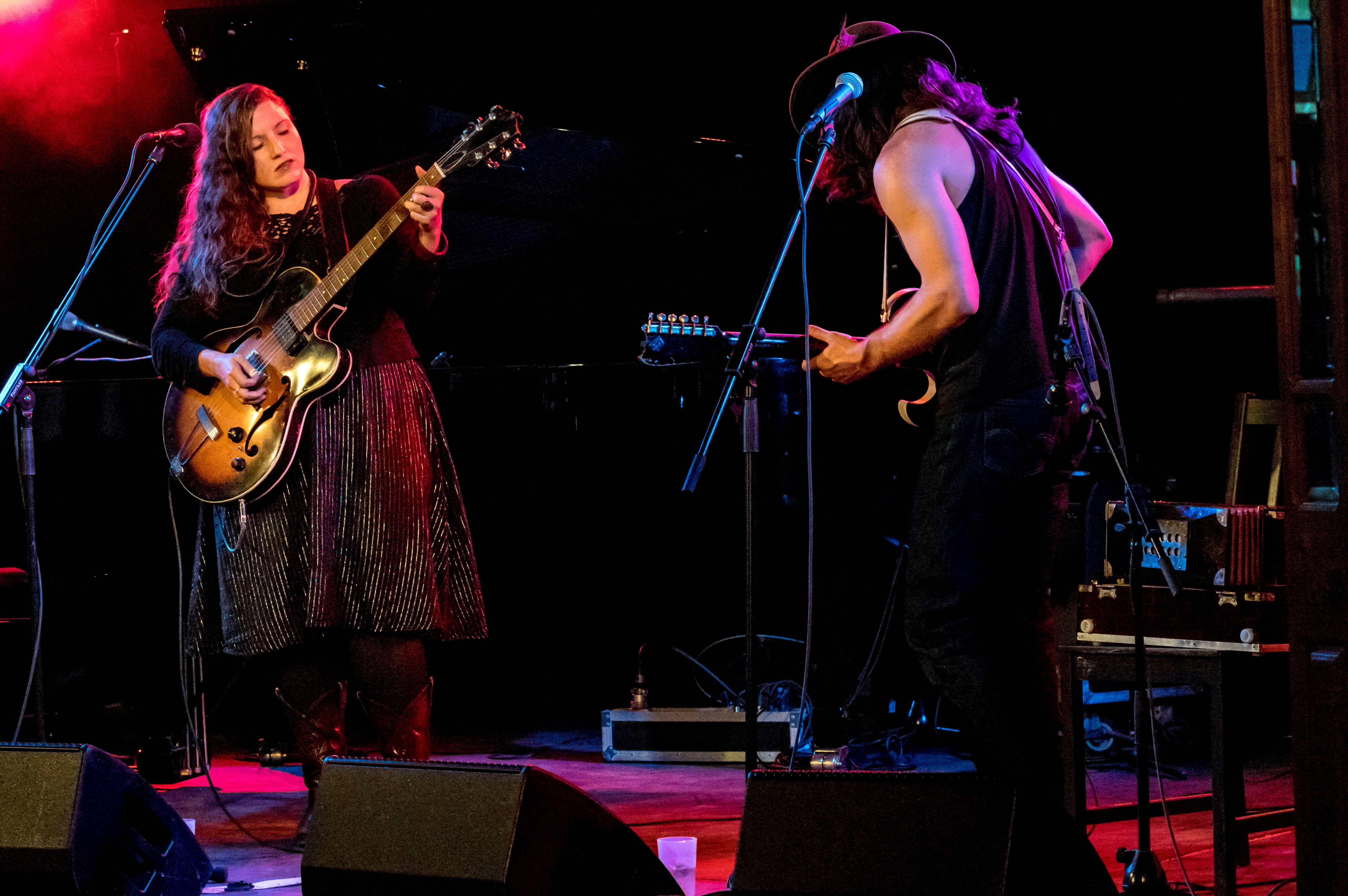 Bilder vom ZMF 2015 Jolie Holland am 12. 07. 2015